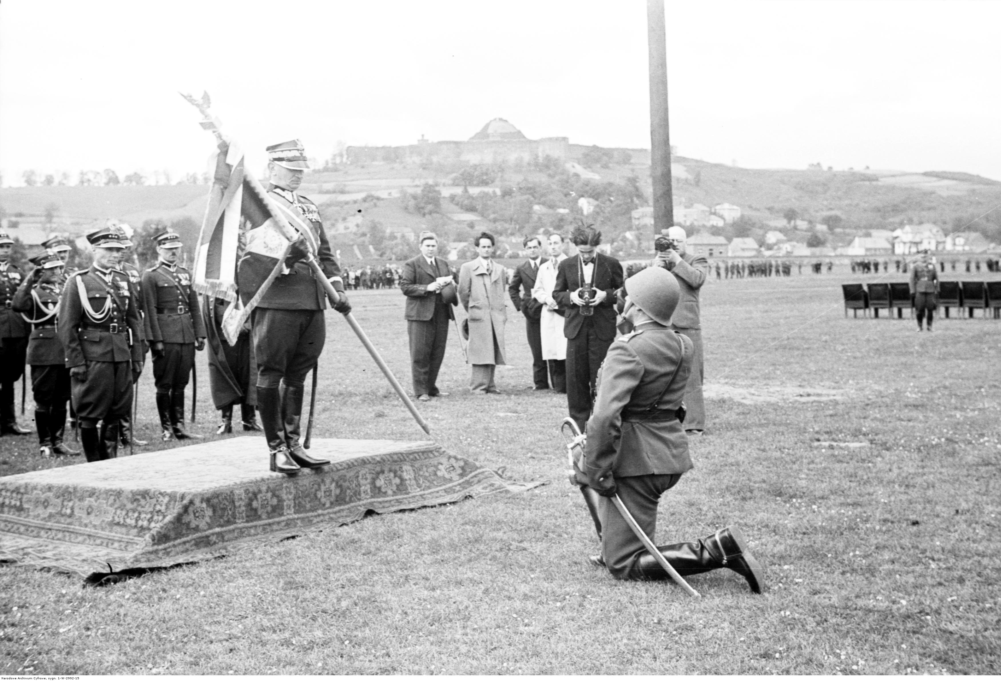 Wręczenie i poświęcenie sztandarów pułkom artylerii na Krakowskich Błoniach. Dowódca 5 Pułku Artylerii Ciężkiej składa przysięgę na sztandar, by wstawszy odebrać go z rąk Inspektora Armii gen. dyw. Juliusza Rómmla. Koncern Ilustrowany Kurier Codzienny - Archiwum Ilustracji. Sygnatura: 1-W-2992-15